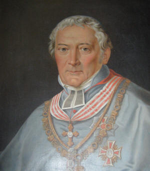 Kardinal Maximilian Joseph Gottfried von Sommerau Beeckh, Bischof von Olmütz